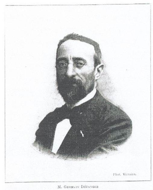 Portrait de Germain DéTANGER